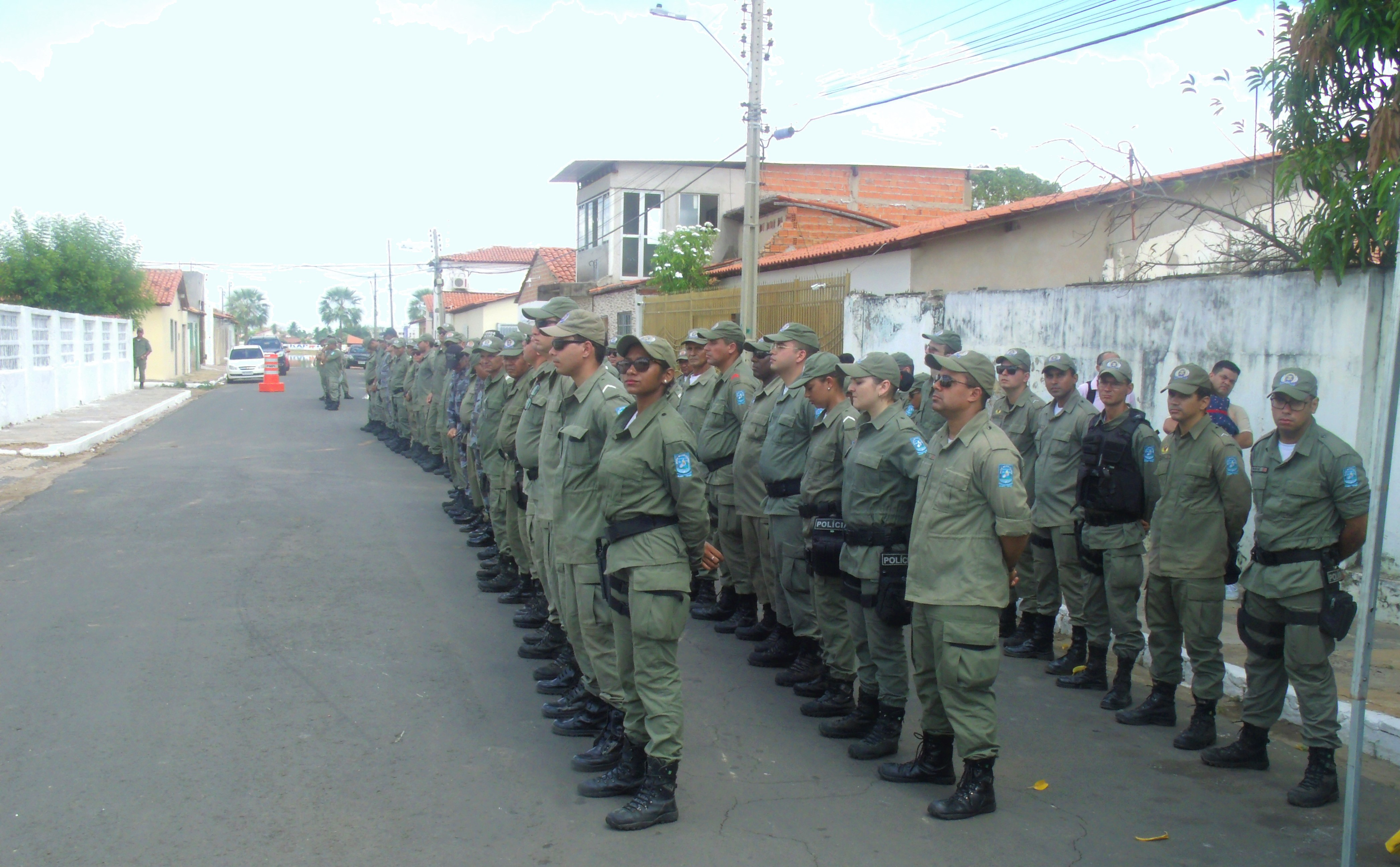 Imagem do 15º Batalhão Heróis do Jenipapo da PM do Piauí.